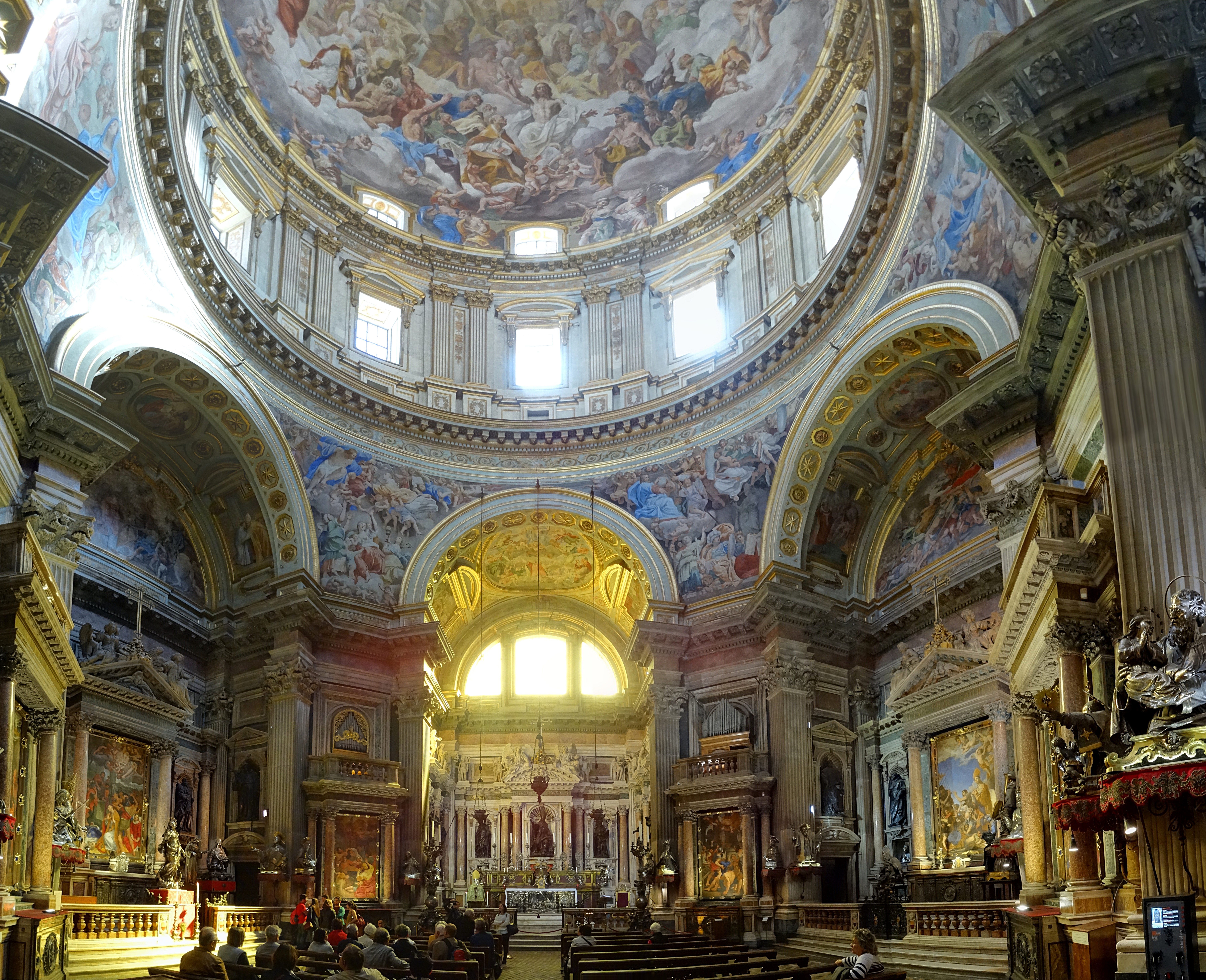 Panorama in der königlichen Schatzkapelle von San Gennaro im Dom von Neapel